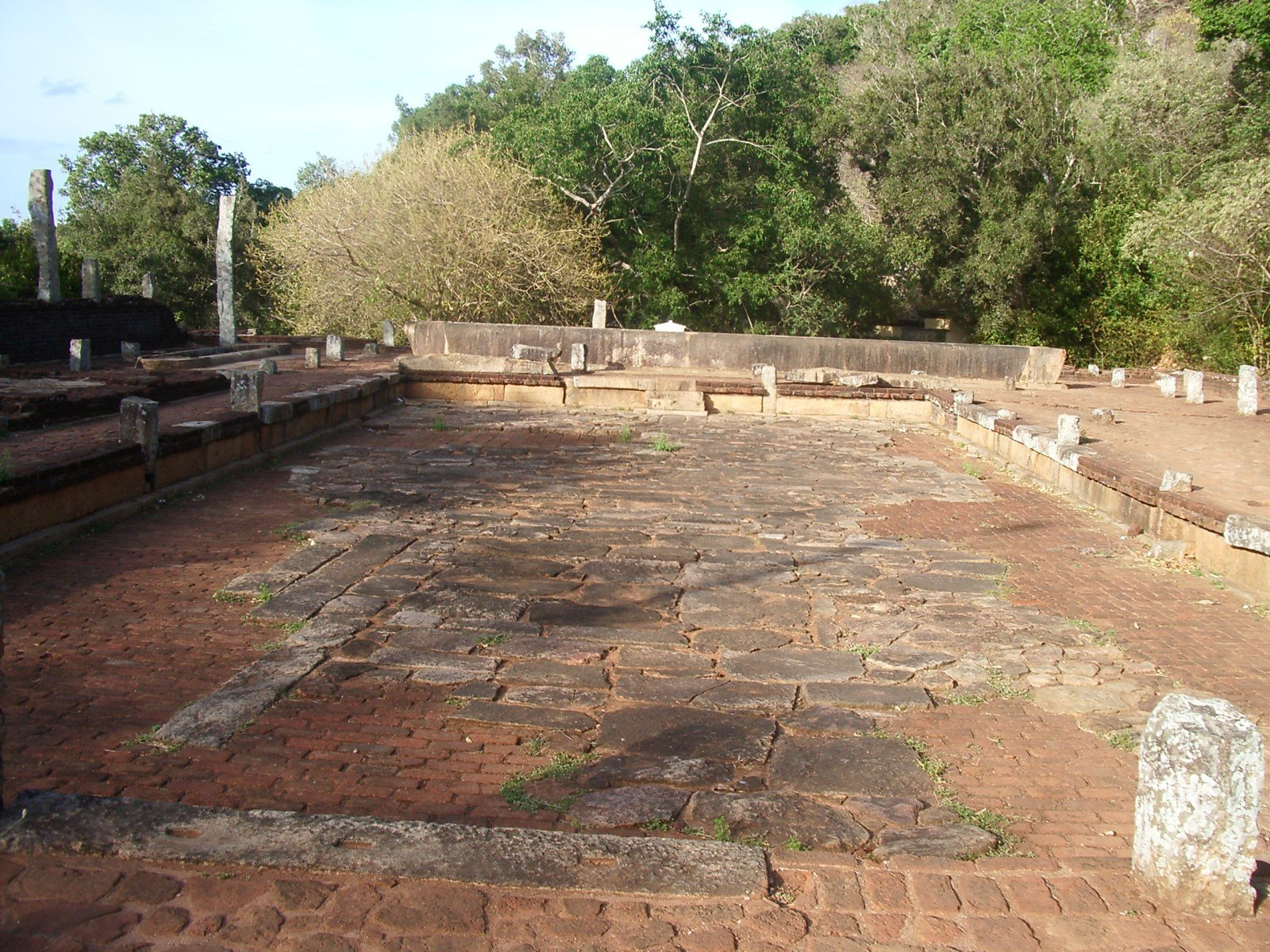 Ruïnes a Mihintale, foto feta per J. Ollé el juliol del 2006